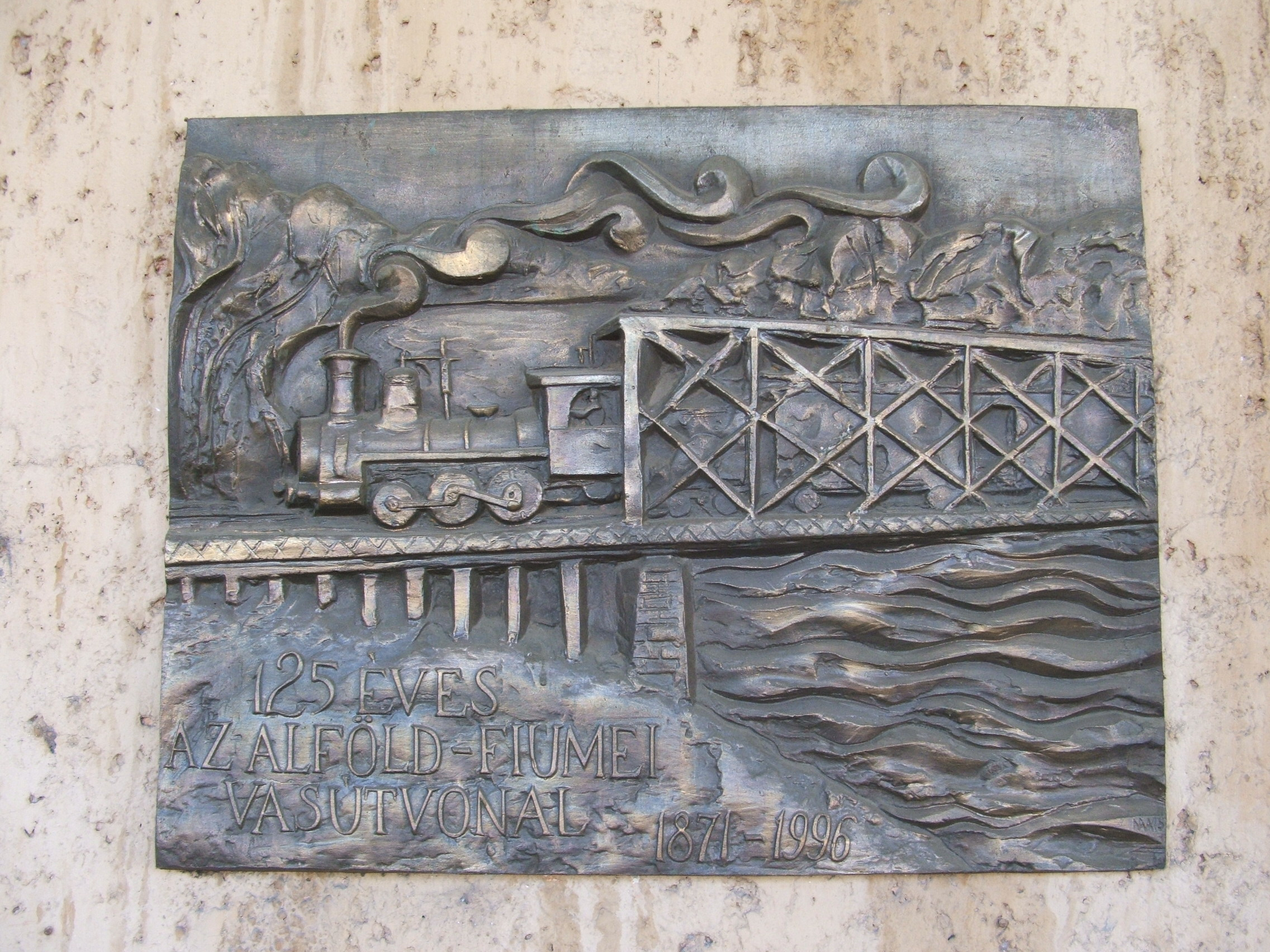 Az AFVT emléktáblája Békéscsabán.